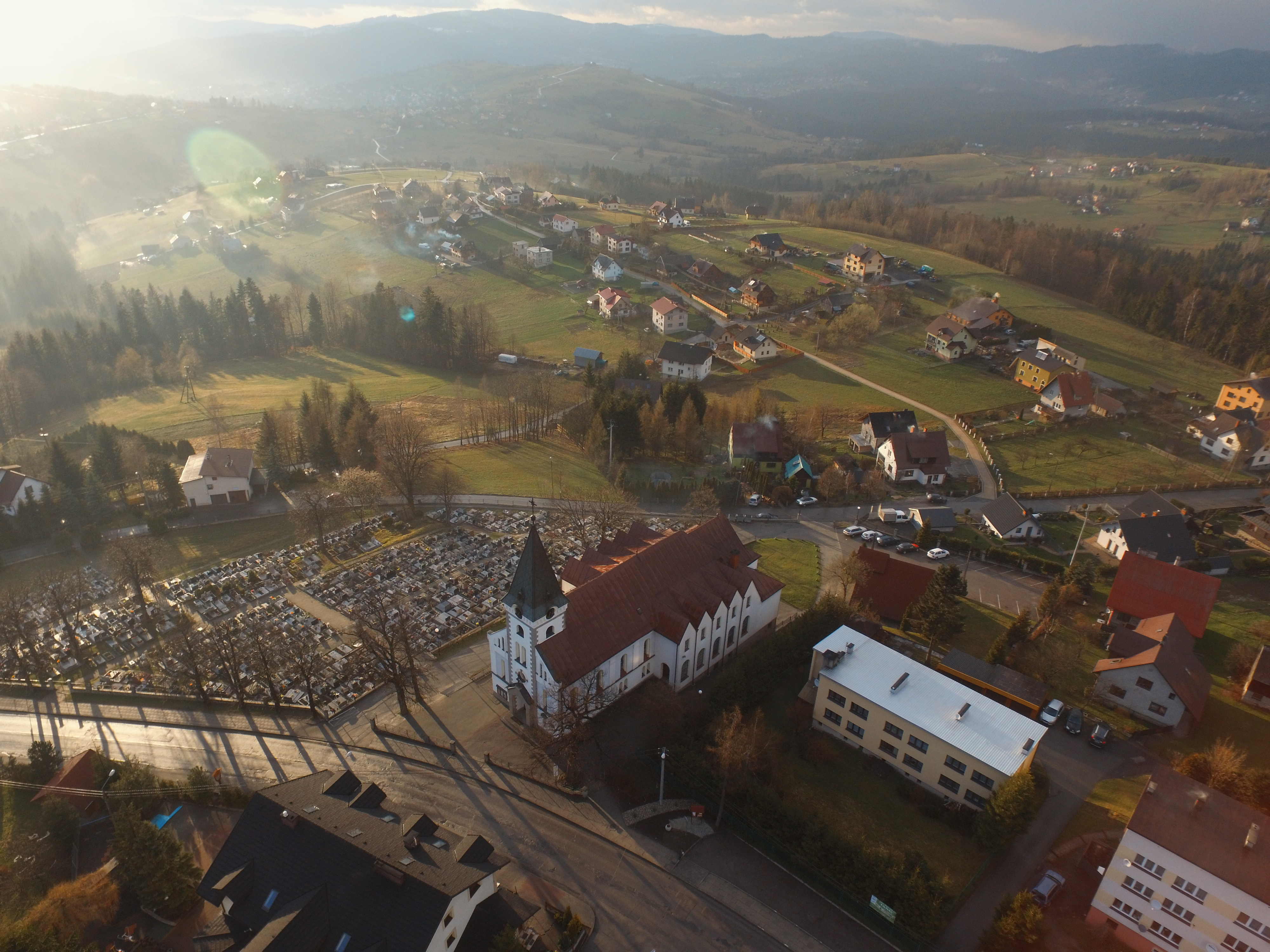 Widok na kościół i cmentarz w Koniakowie